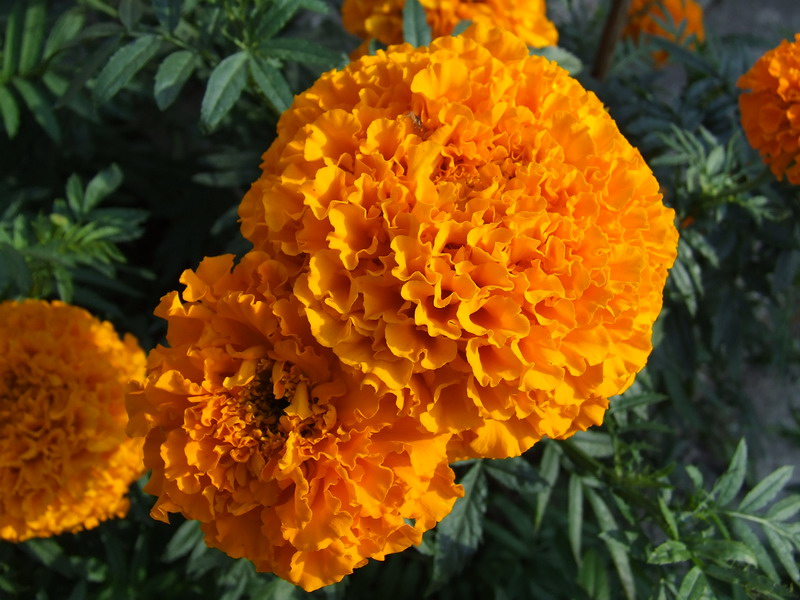 Tagetes. Vilkija, Kaunas district, Lithuania.